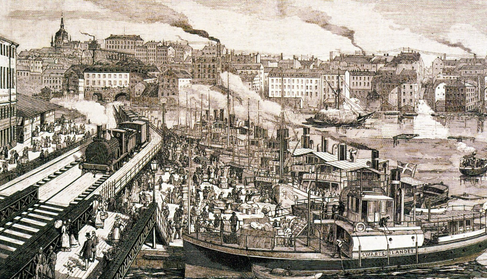 Sammanbindningsbanan och trängsel vid Munkbrohamnen, Gamla stan